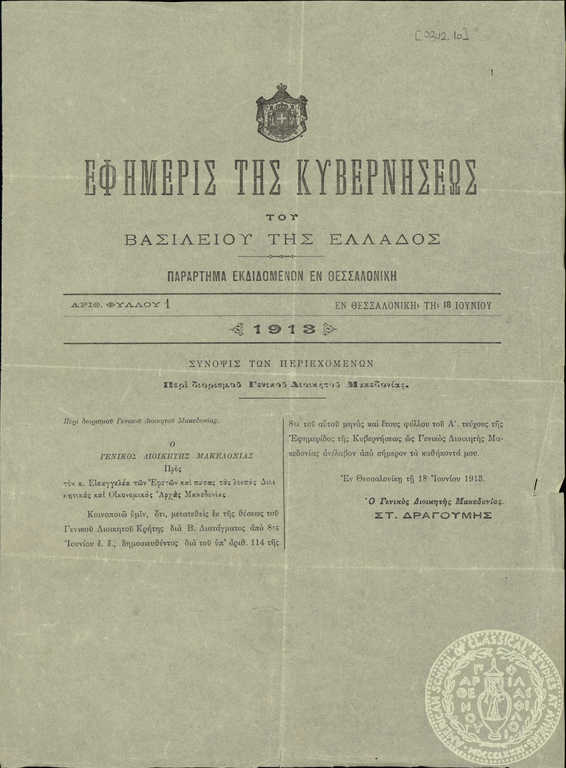 Правителствен вестник, с който Стефанос Драгумис е назначен за генерал-губернатор на Македония